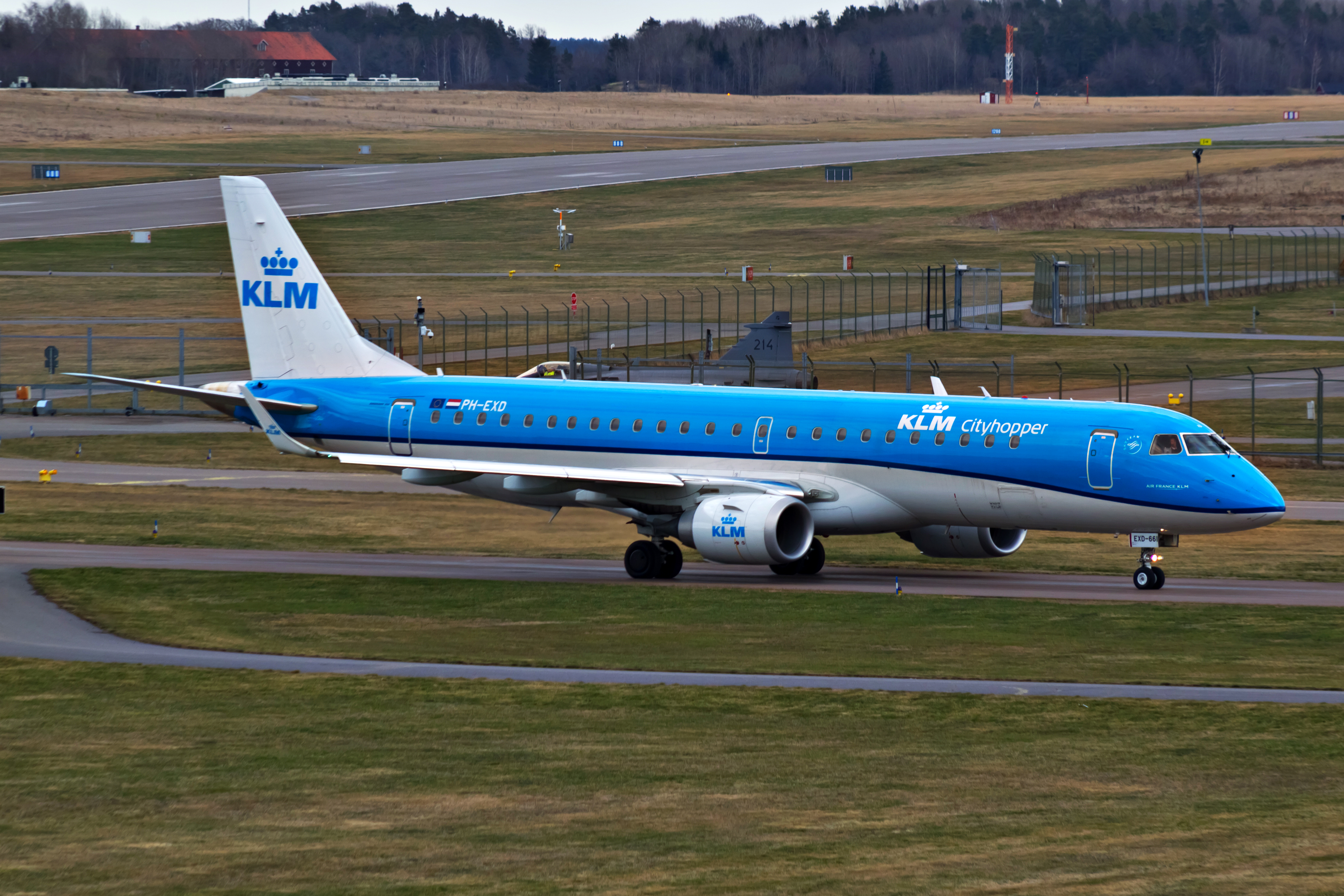 Embraer 190 de KLM Cityhopper no aeroporto de Linköping.